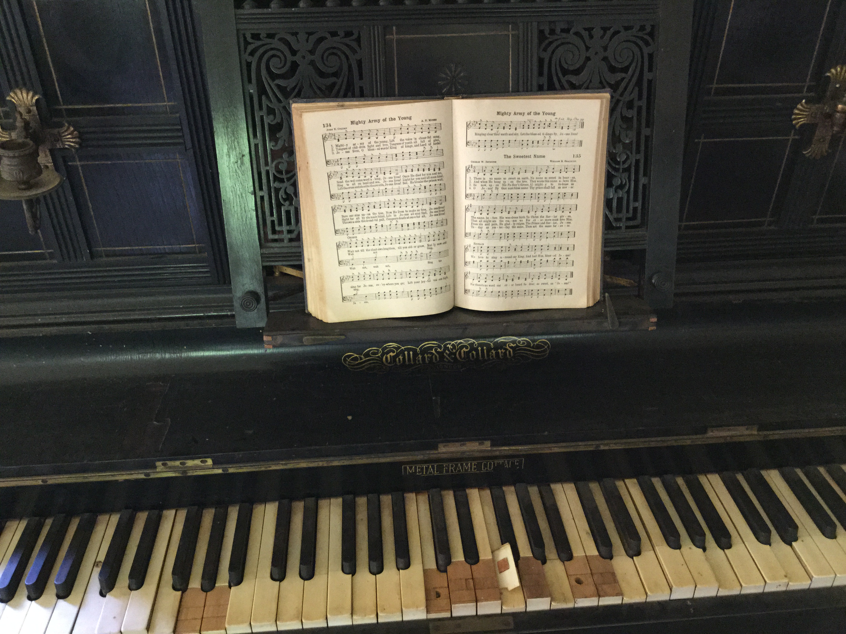 Cherokee Heritage Museum